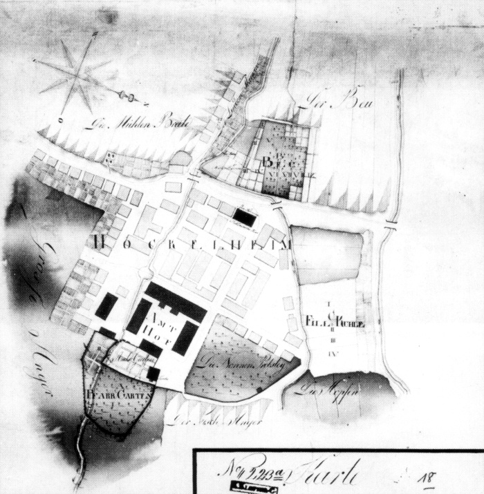 Historischer Lageplan von Höckelheim mit Amtshof